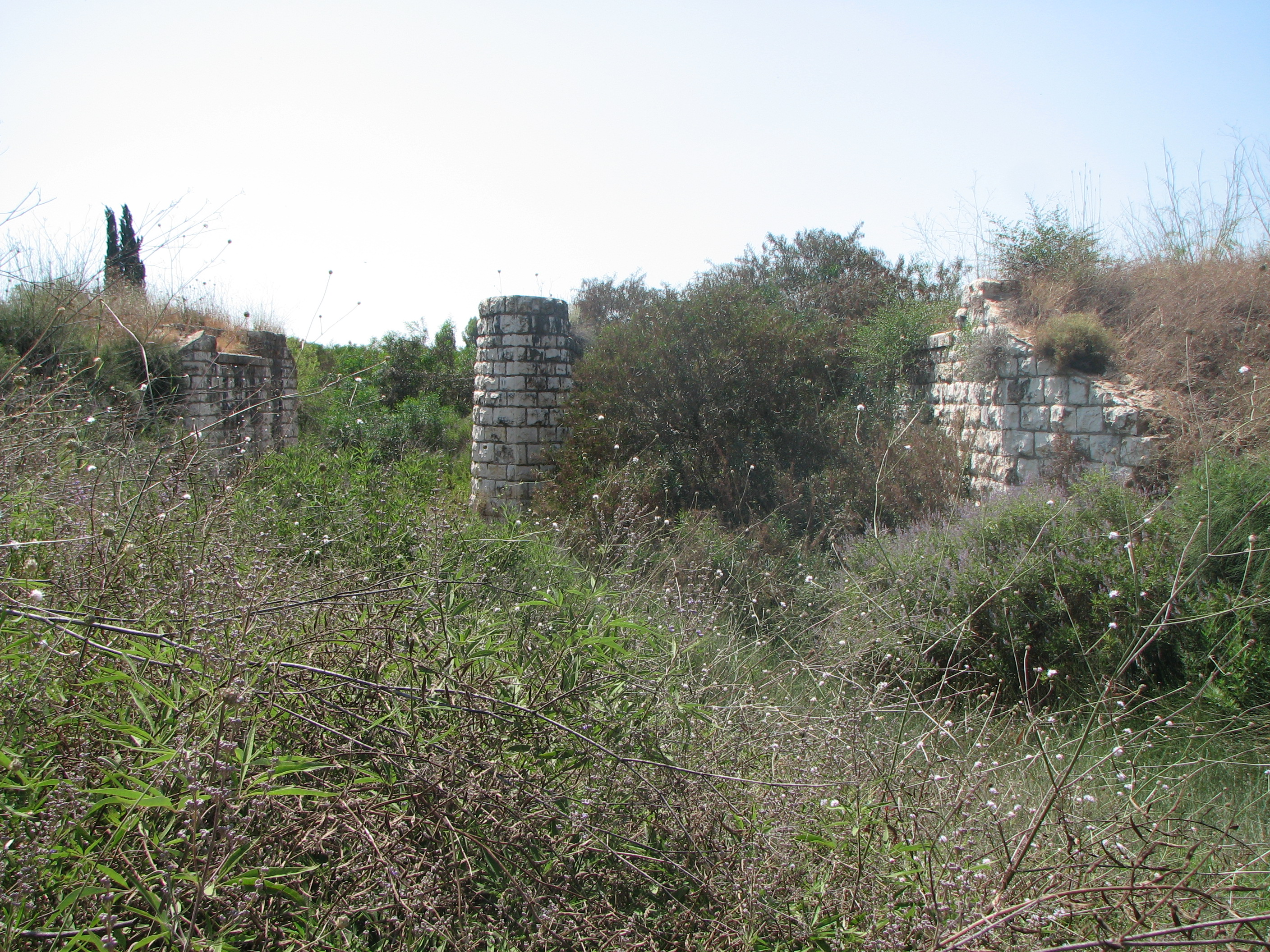 שרידי גשר רכבת באפיק נחל בית עריף סמוך לשוהם